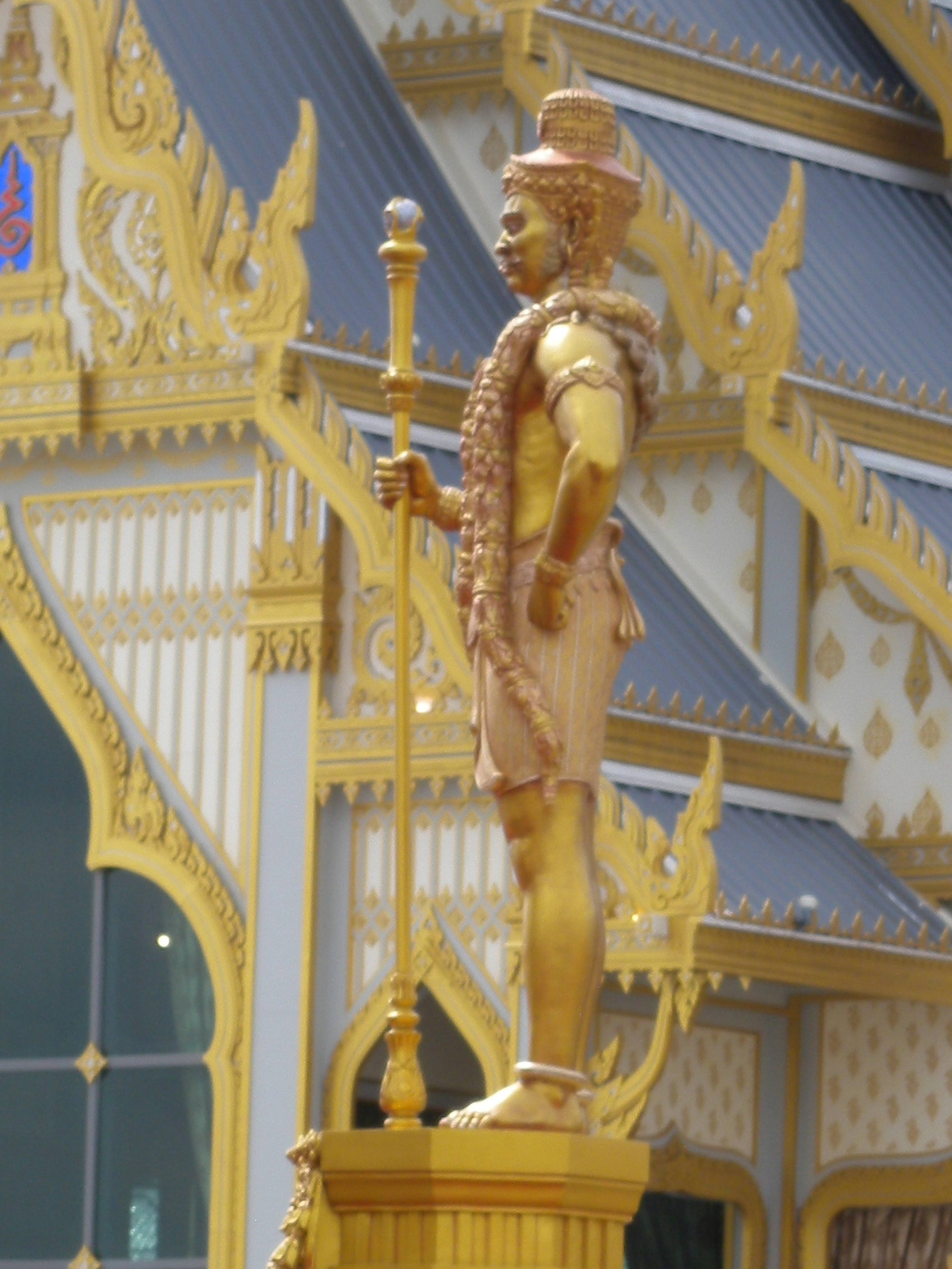 ประติมากรรมรูปพระเวสสุวัณ จตุโลกบาลประจำทิศเหนือ มองจากด้านซ้าย ติดตั้งที่ฐานชาลาชั้นที่ 1 ขององค์พระเมรุมาศสำหรับพระราชพิธีถวายพระเพลิงพระบรมศพ พระบาทสมเด็จพระปรมินทรมหาภูมิพลอดุลยเดช บรมนาถบพิตร ณ มณฑลพิธีท้องสนามหลวง บันทึกภาพเมื่อวันที่ 21 พฤศจิกายน พ.ศ. 2560 หมายเหตุ: ภาพที่ปรากฏอยู่นี้ไม่สามารถขึ้นไปถ่ายภาพประติมากรรมจากด้านหน้าตรงได้ เนื่องจากคณะกรรมการจัดนิทรรศการพระราชพิธีถวายพระเพลิงพระบรมศพพระบาทสมเด็จพระปรมินทรมหาภูมิพลอดุลยเดช บรมนาถบพิตร ได้ห้ามผู้เข้าชมนิทรรศการขึ้นไปบนองค์พระเมรุมาศ เพื่อป้องกันความเสียหายที่อาจเกิดขึ้นต่อองค์พระเมรุมาศและศิลปกรรมประกอบต่างๆ อันเกิดจากผู้เข้าชมนิทรรศการ